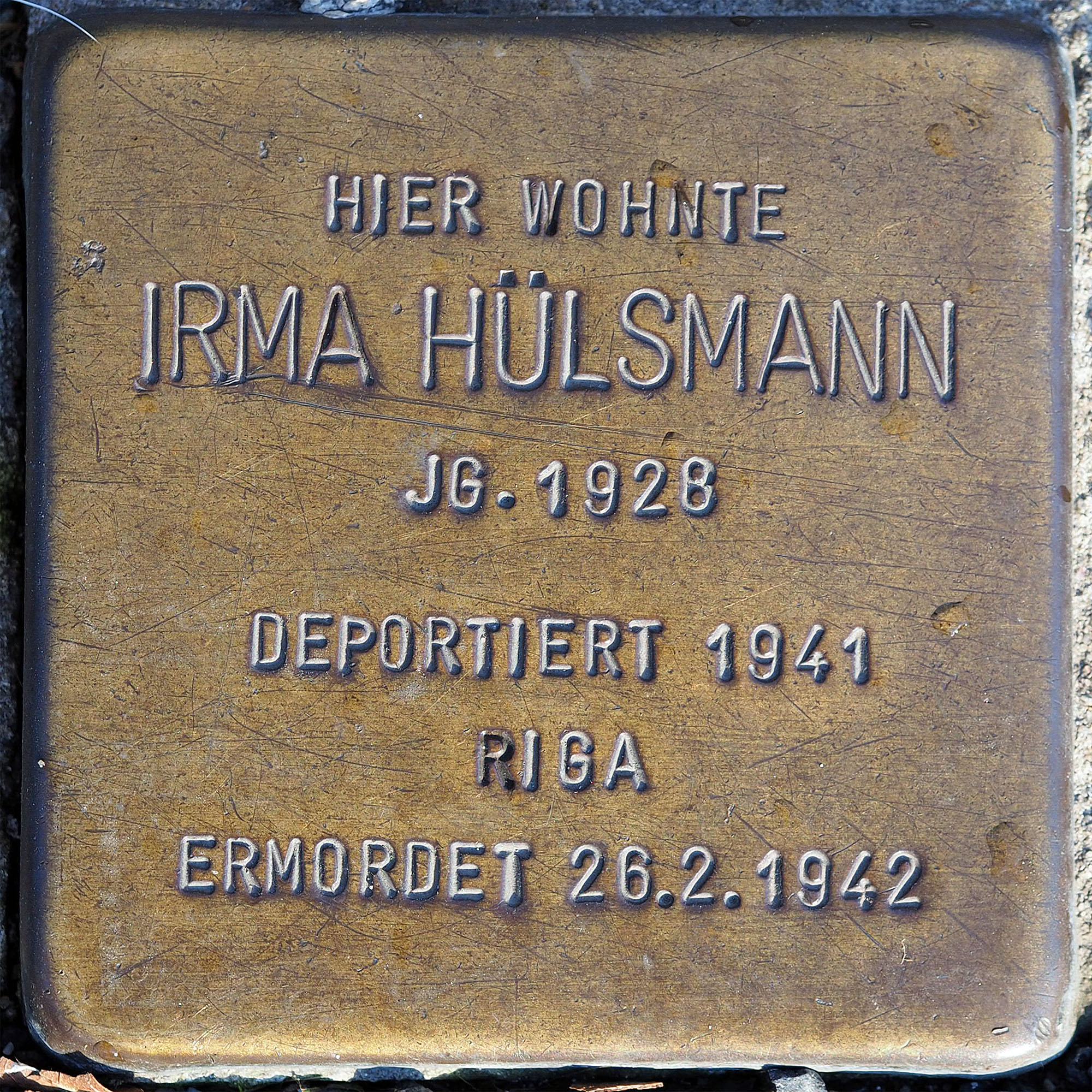 Stolpersteine MG: Hülsmann, Irma